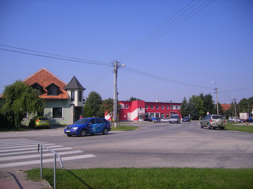 Köbölkút - a faluközpontban